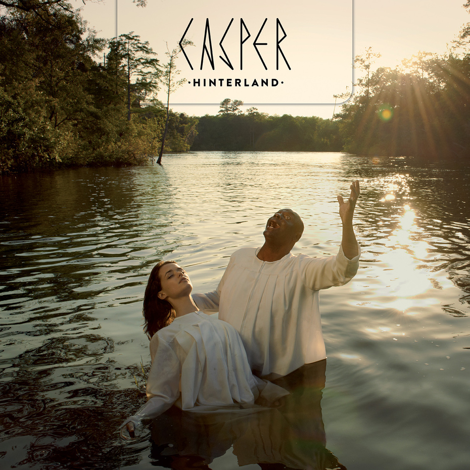 Cover des Albums „Hinterland“